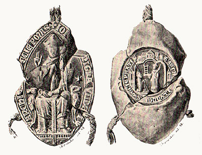 Jens Grands segl. Tegning af E Rondahl -98 fra: Vort folks historie af Johan Ottesen 1901